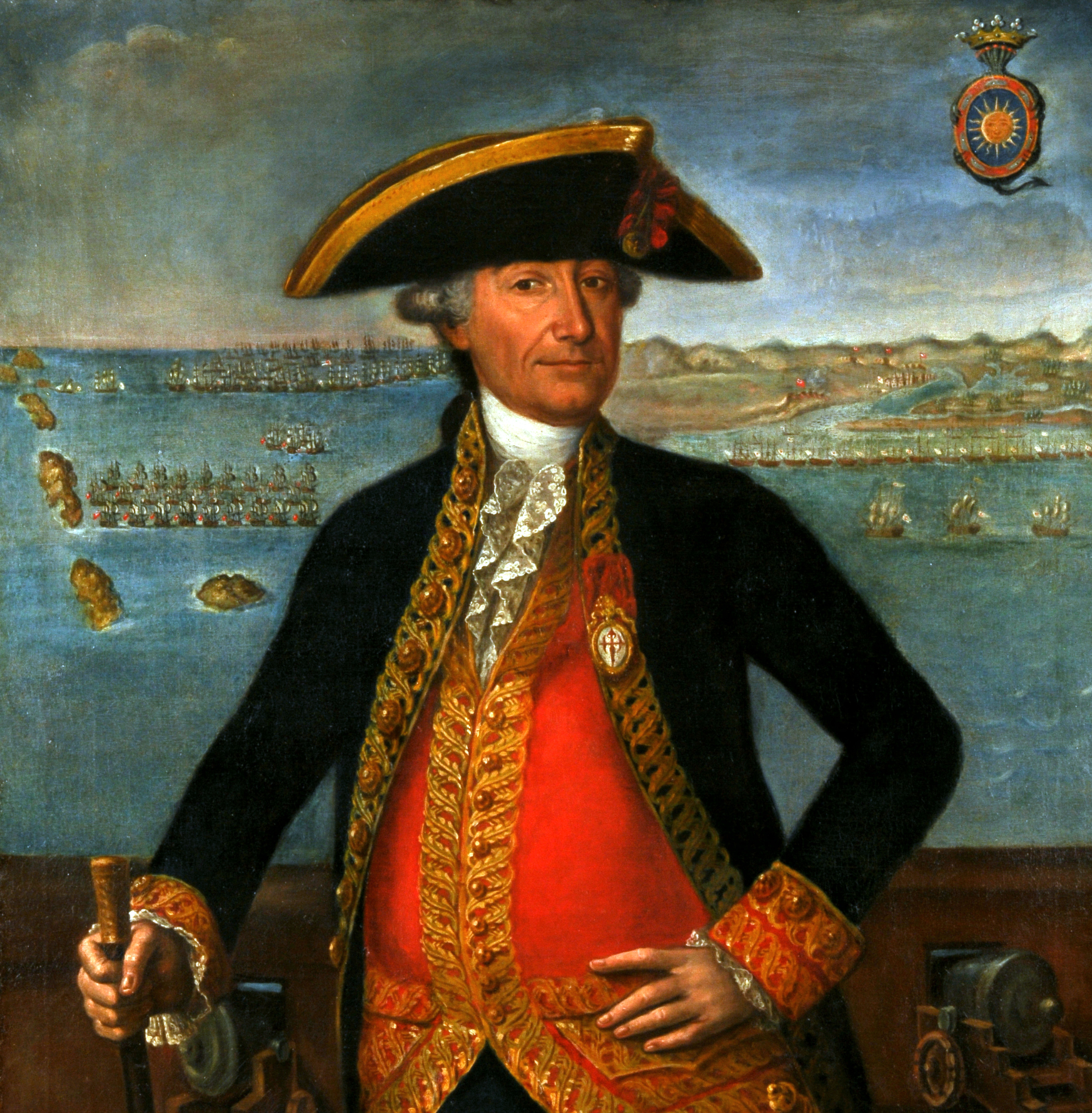 Retrato del marino español José Solano y Bote (1726-1806), que fue caballero de la Orden de Santiago y capitán general de la Real Armada Española.